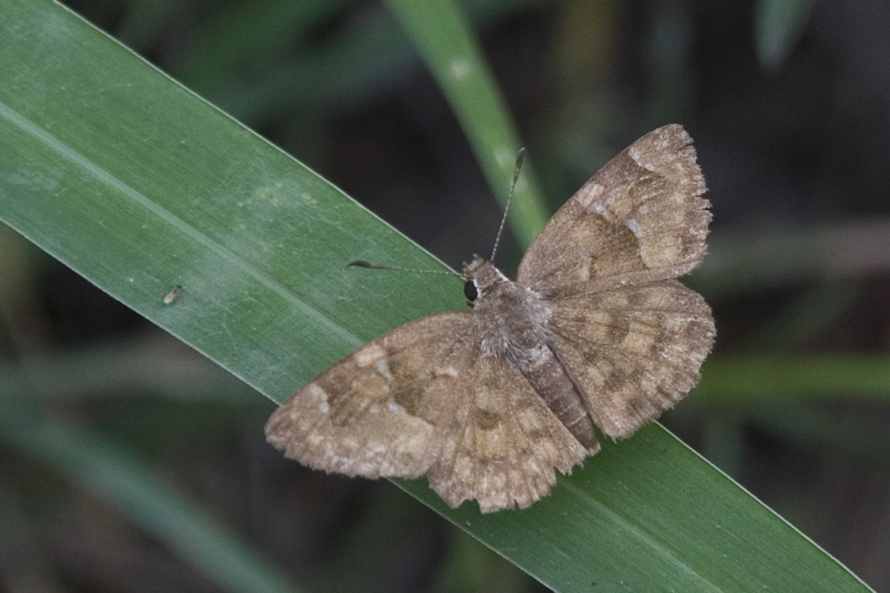 Sarangesa phidyle (Walker, 1870), Orange Flat